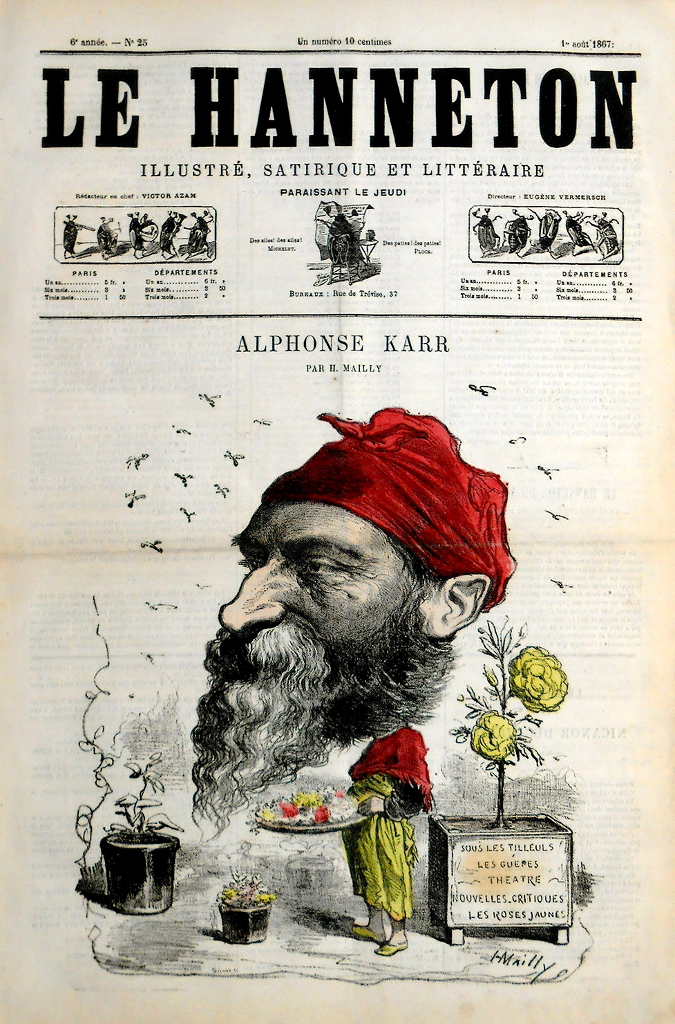 Le Hanneton n° 25 du 1er août 1867 : Alphonse Karr (1808-1890), dessin d'Hippolyte Mailly.